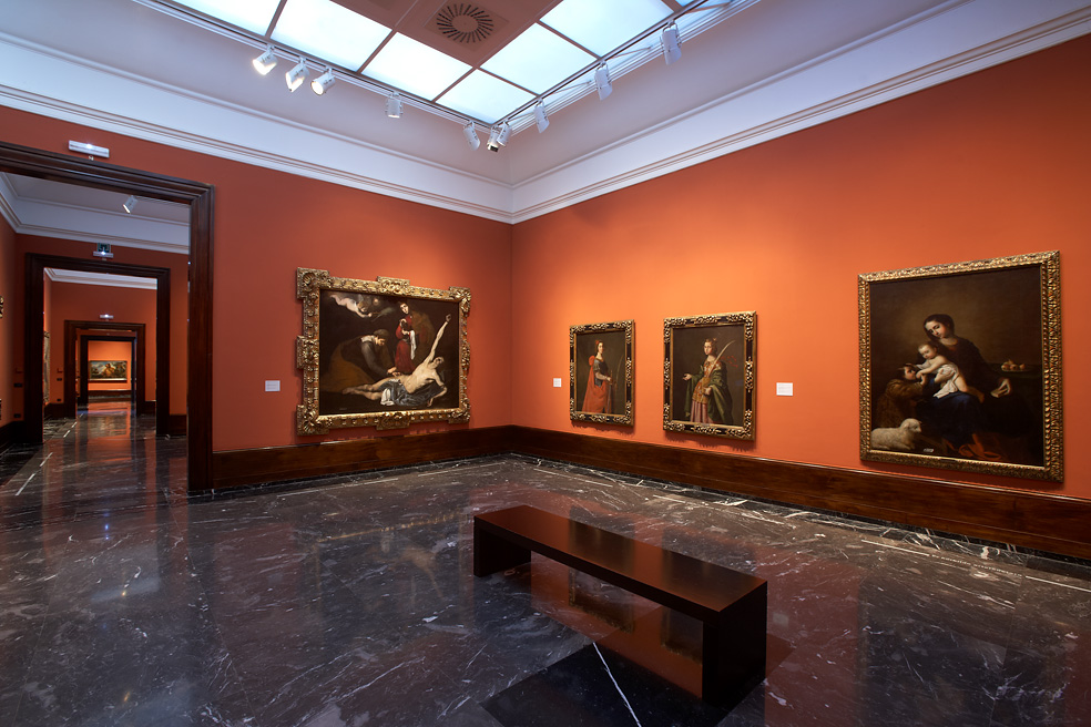 Vista de sala del edifico antiguo.